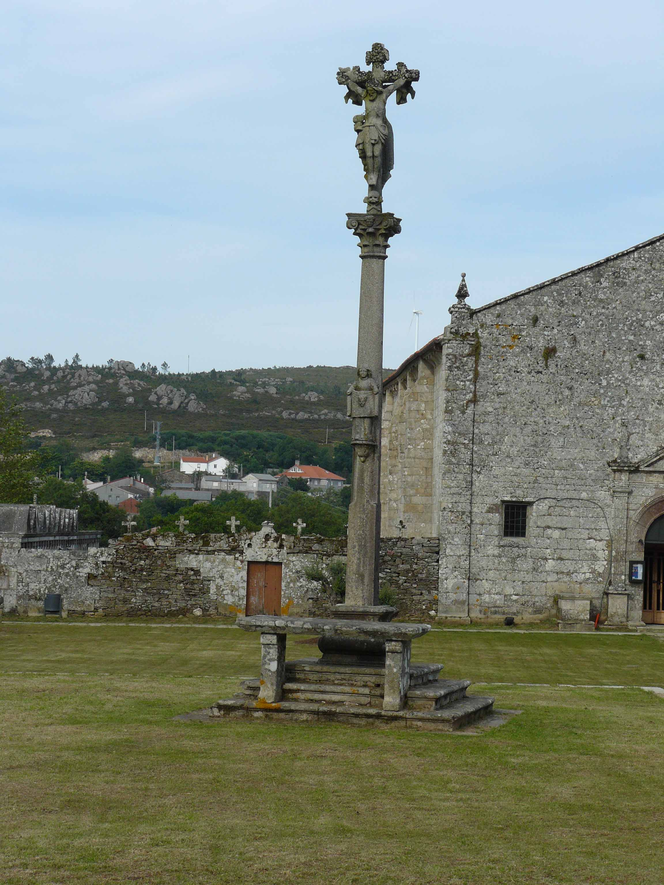 Cruceiro de Aciveiro, Forcarei.